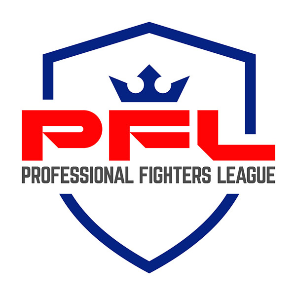 pfl